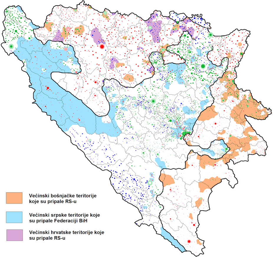 Razmjene teritorija koje su se desile devedesetih godina